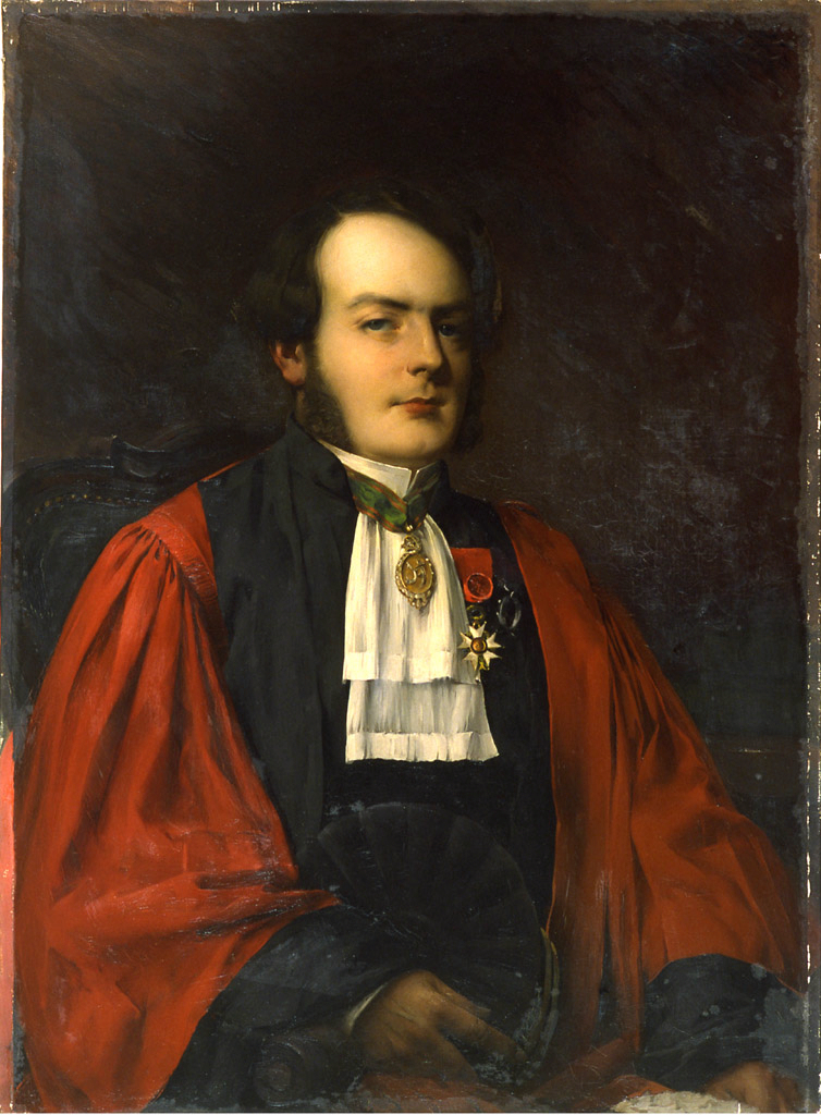 Portrait d'Edouard Bonie, conseiller à la cour d'appel de Bordeaux, par Paul-François QUINSAC (1858-1929). Huile sur toile. Hauteur sans cadre en cm 100,5 ; Largeur sans cadre en cm 73,5. Numéro d'inventaire : Bx M 1540. Historique : Ancienne collection Bonie. Mode d'acquisition Legs Bonie, 1895. Musée des Beaux-Arts (Mairie de Bordeaux. Cliché L. GAUTHIER, F. DEVAL).